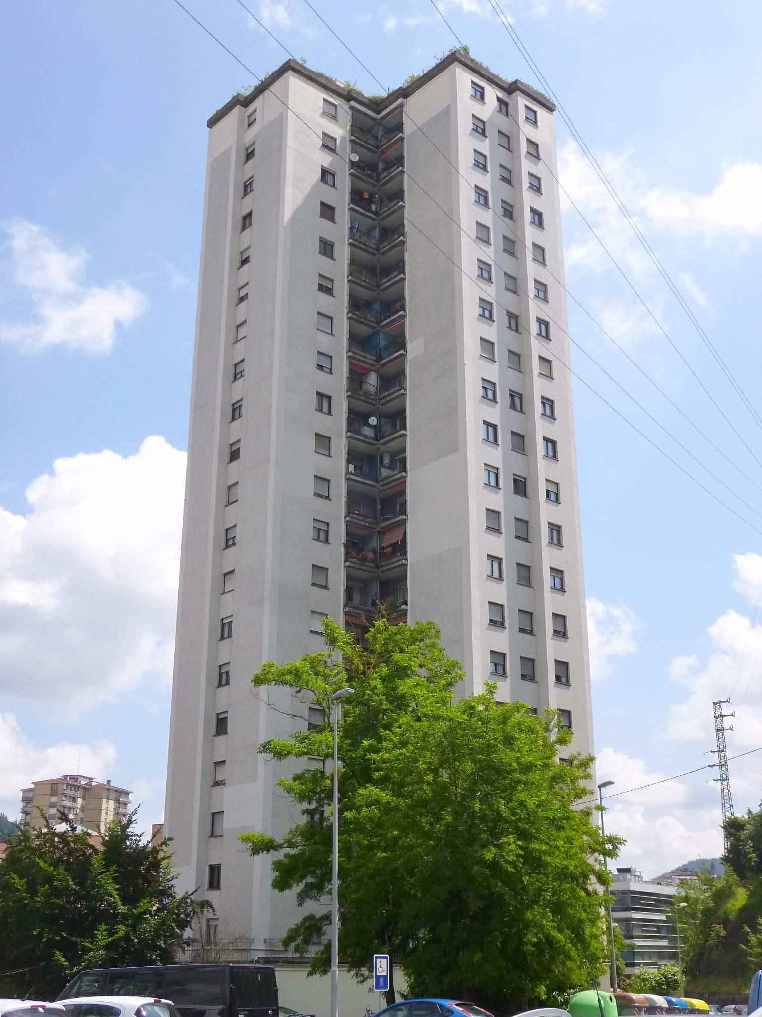 Torre Eguzki, en Arrasate/Mondragón (Gipuzkoa)